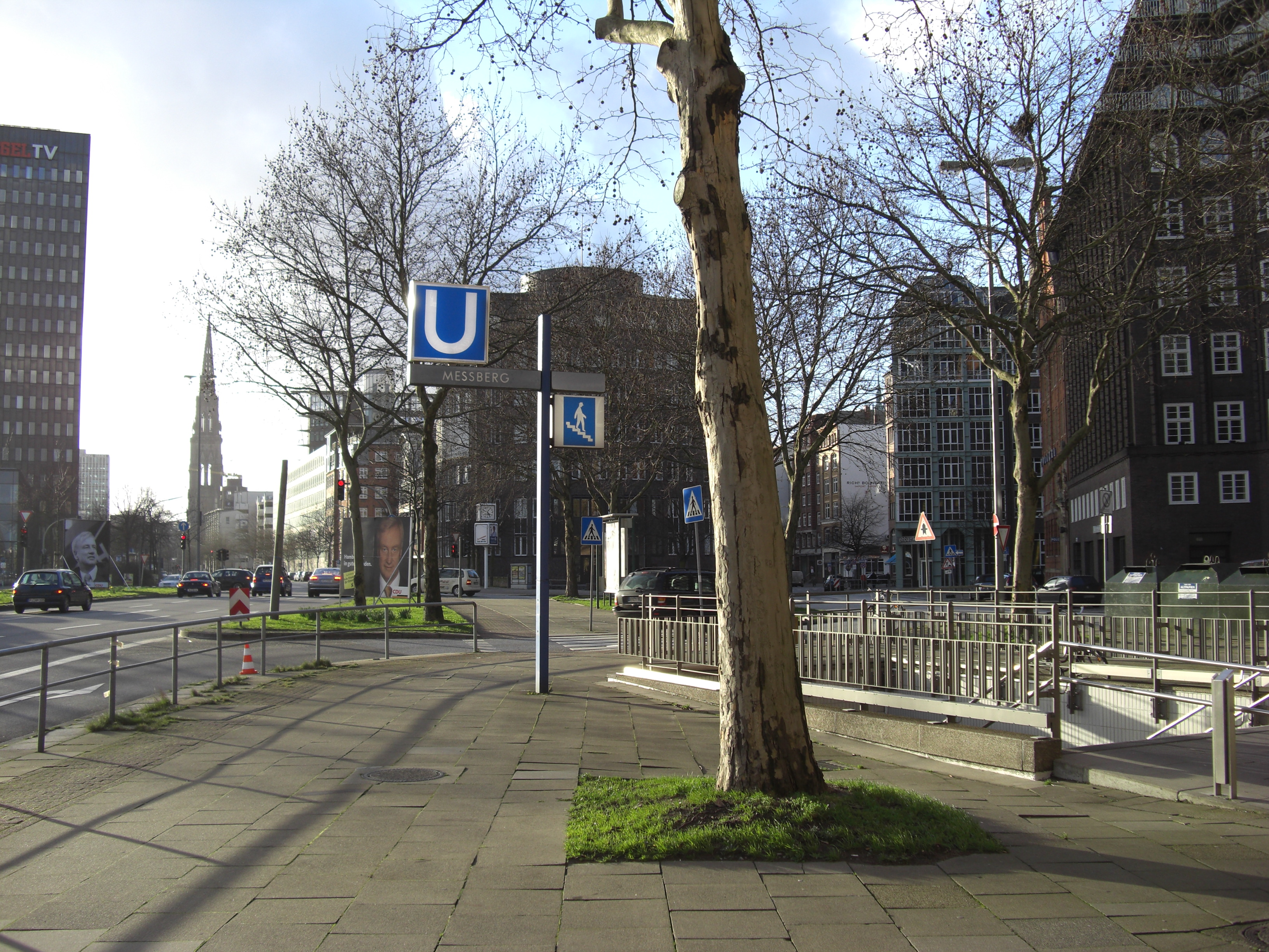 Der "Meßberg" in Hamburg - direkt an der Willy-Brandt-Straße gelegen, früher einer der zentralen Hamburger Marktplätze, heute kein richtiger Platz mehr sondern eher Verkehrsinsel.